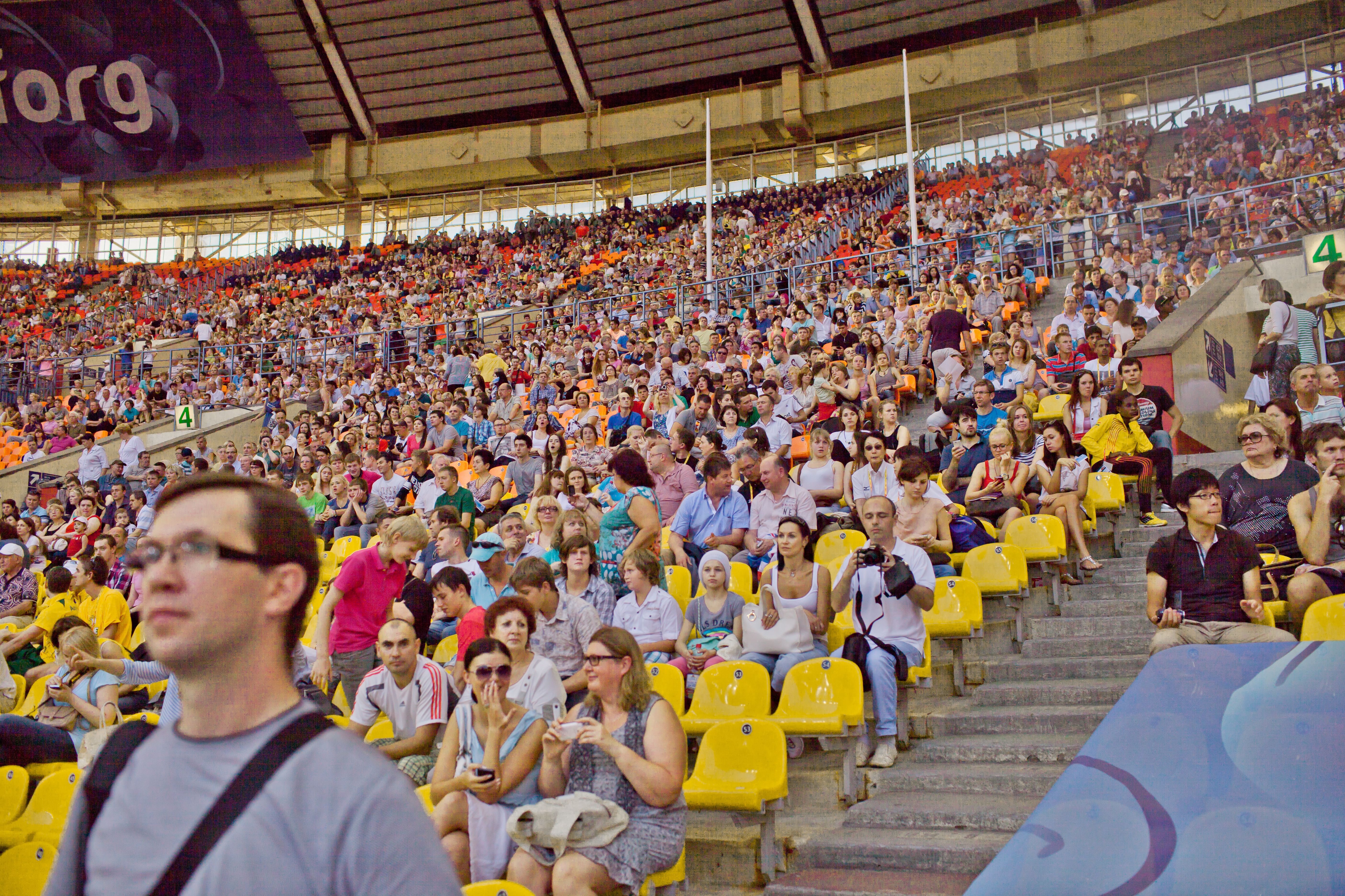 Первый день Чемпионата мира по легкой атлетике в Москве